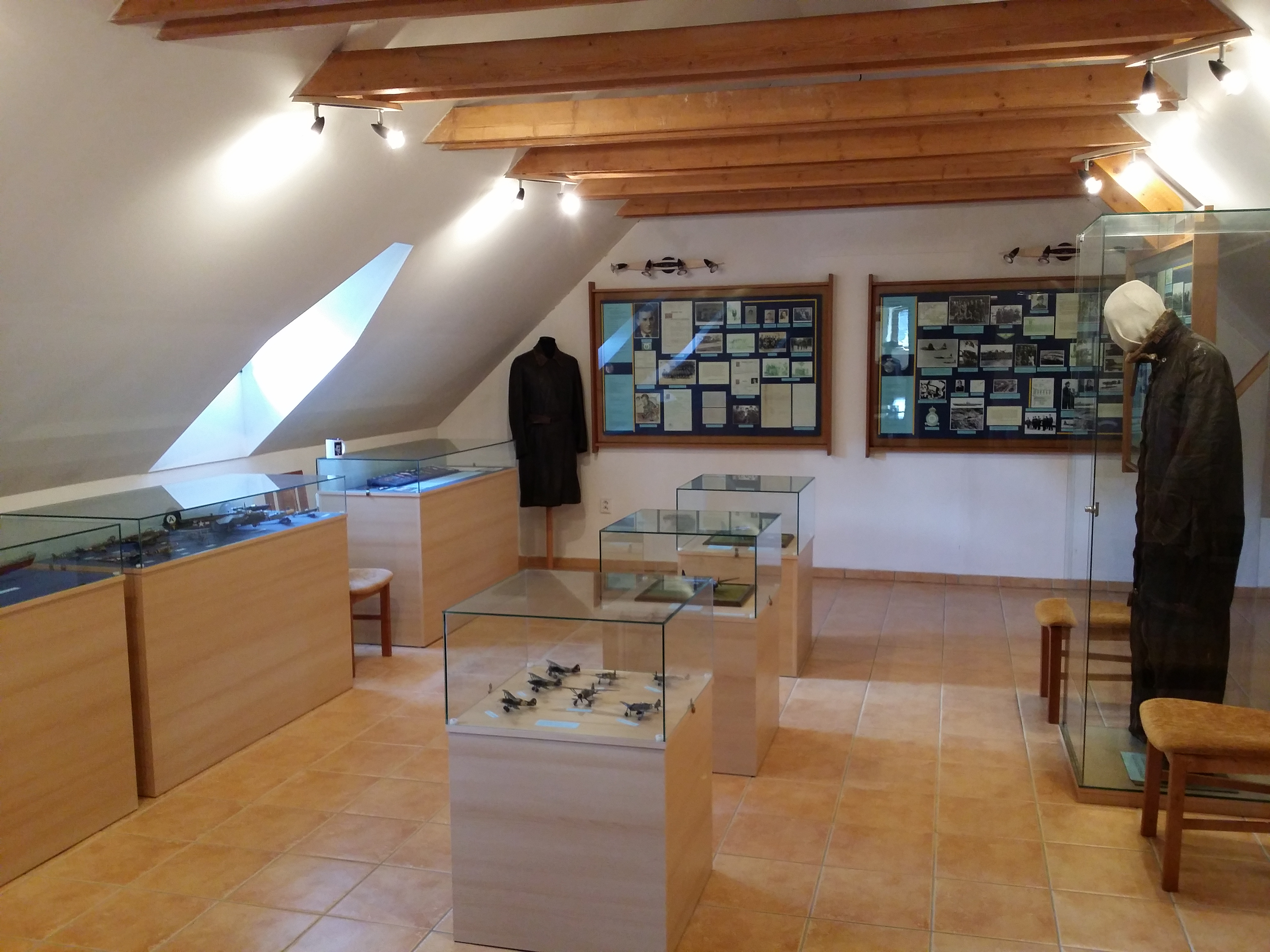 Expozice o J. Stránském v Památníku Karla Havlíčka Borovského v Havlíčkově Borové (se souhlasem pracovníků muzea i autora).